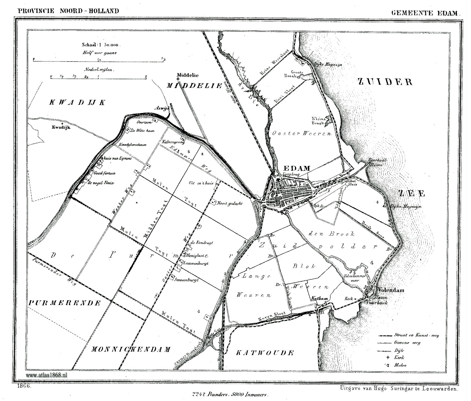 Oude kaart van Edam